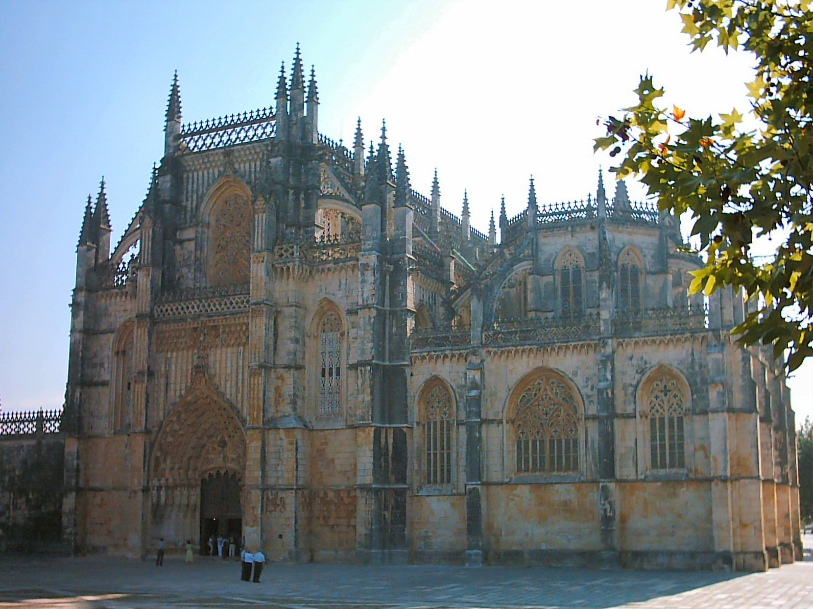 Mosteiro da Batalha, Portugal